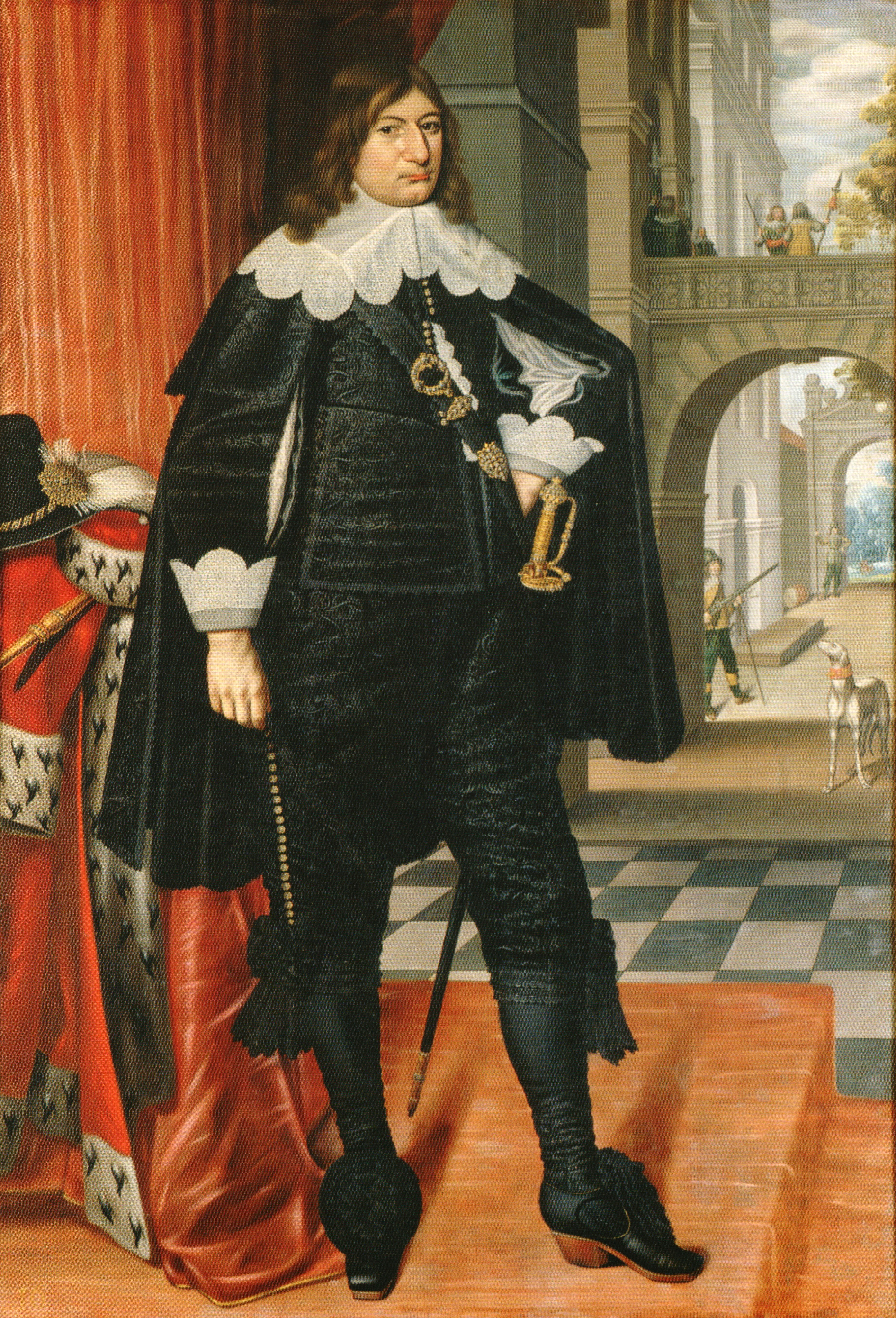 Friedrich Wilhelm von Brandenburg, der Große Kurfürst. Das Bild entstand während seiner Residenzzeit im Königsberger Schloss.